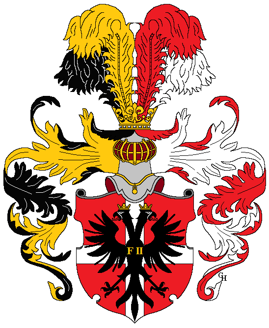 Wappen des österreichischen Beamten und späteren Wiener Bürgermeisters Stephan Wohlleben (1751–1823), verliehen anlässlich seiner Erhebung in den österreichischen Adelsstand mit dem Ehrenwort "Edler von" 1801. Zeichnung von Gerd Hruška ( Für weitere Informationen zu dieser Standeserhebung siehe (